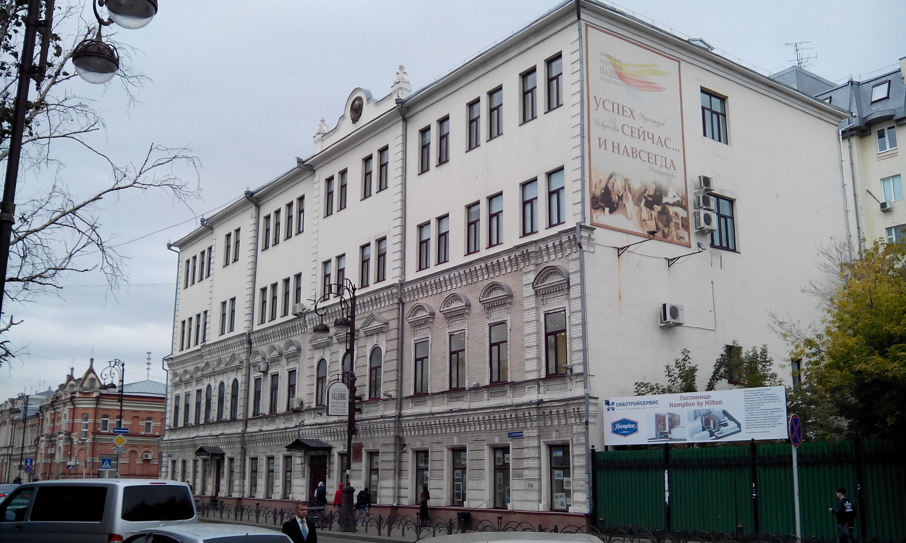 Дом жилой (Тюменская область, Тюмень, улица Республики, 19)